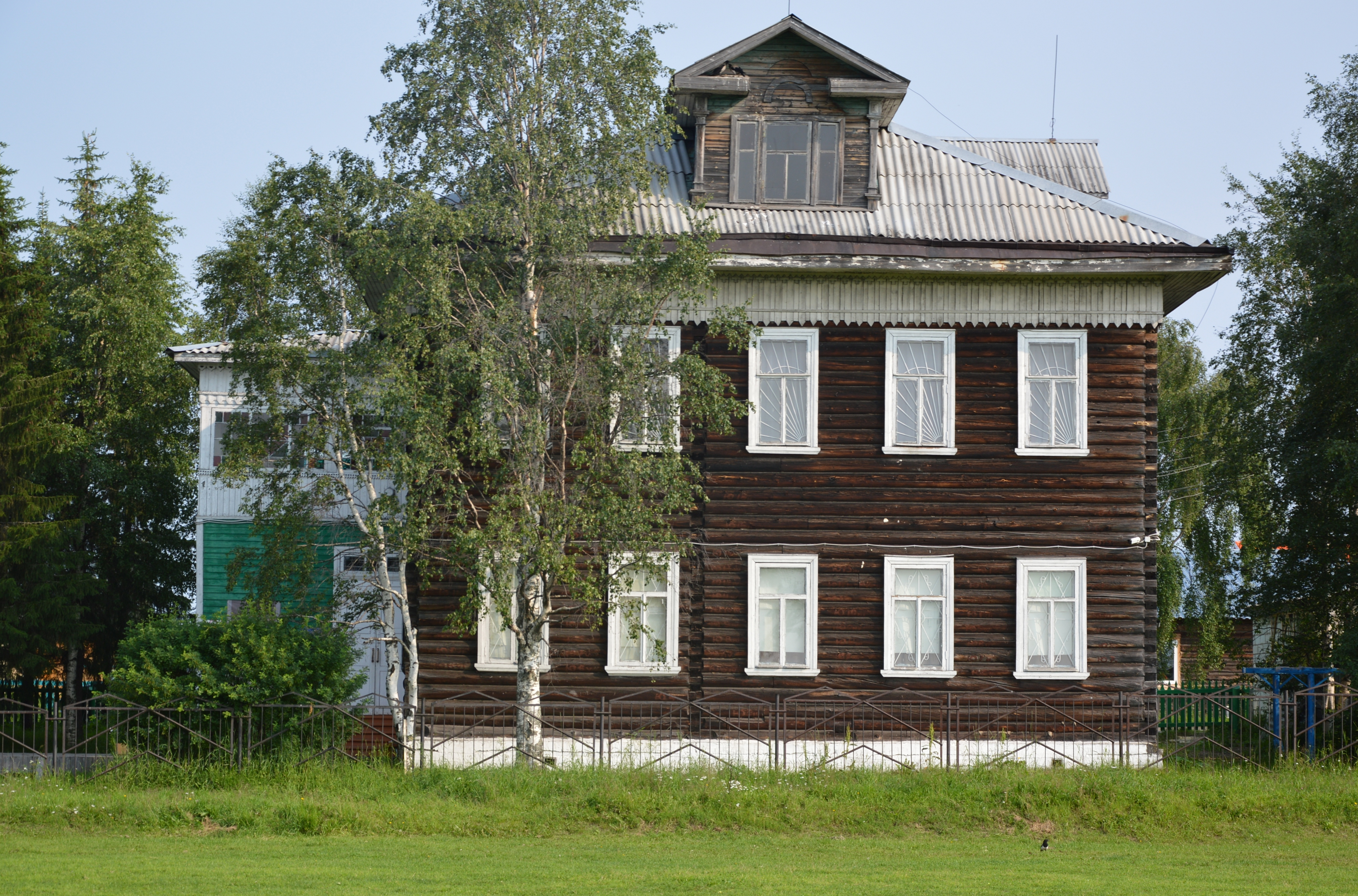 Главный корпус Печорской опытной сельскохозяйственной станции: улица Нагорная, 101, Усть-Цильма, Усть-Цилемский район, Республика Коми Основное здание МБУ "Усть-Цилемский историко-мемориальный музей А.В. Журавского"